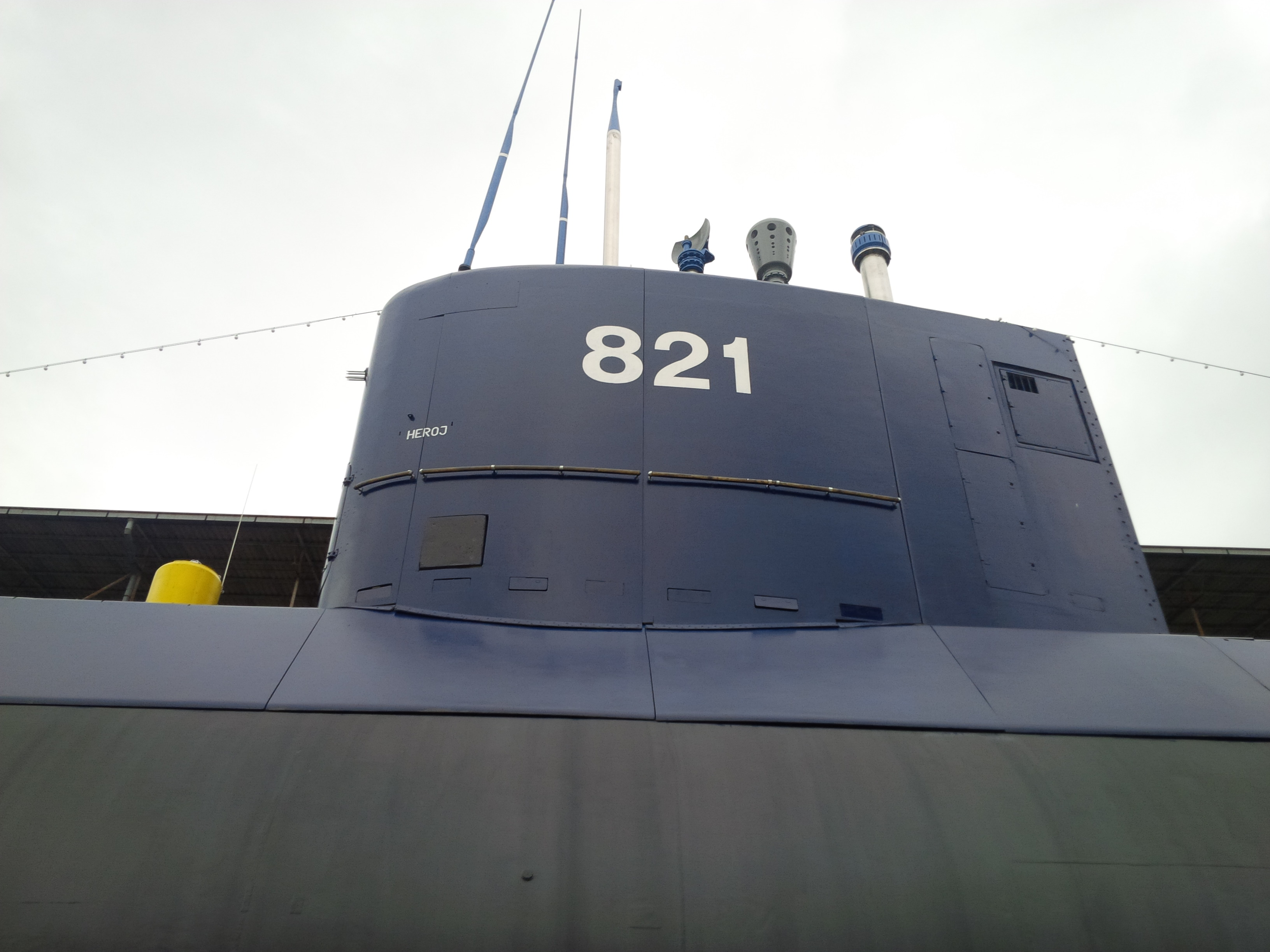 P821 "Heroj" on dry dock in Porto Montenegro - Tivat, Montenegro.